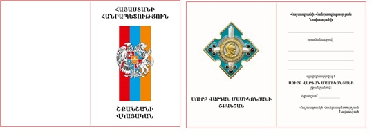 «Սուրբ Վարդան Մամիկոնյան» շքանշանի վկայական